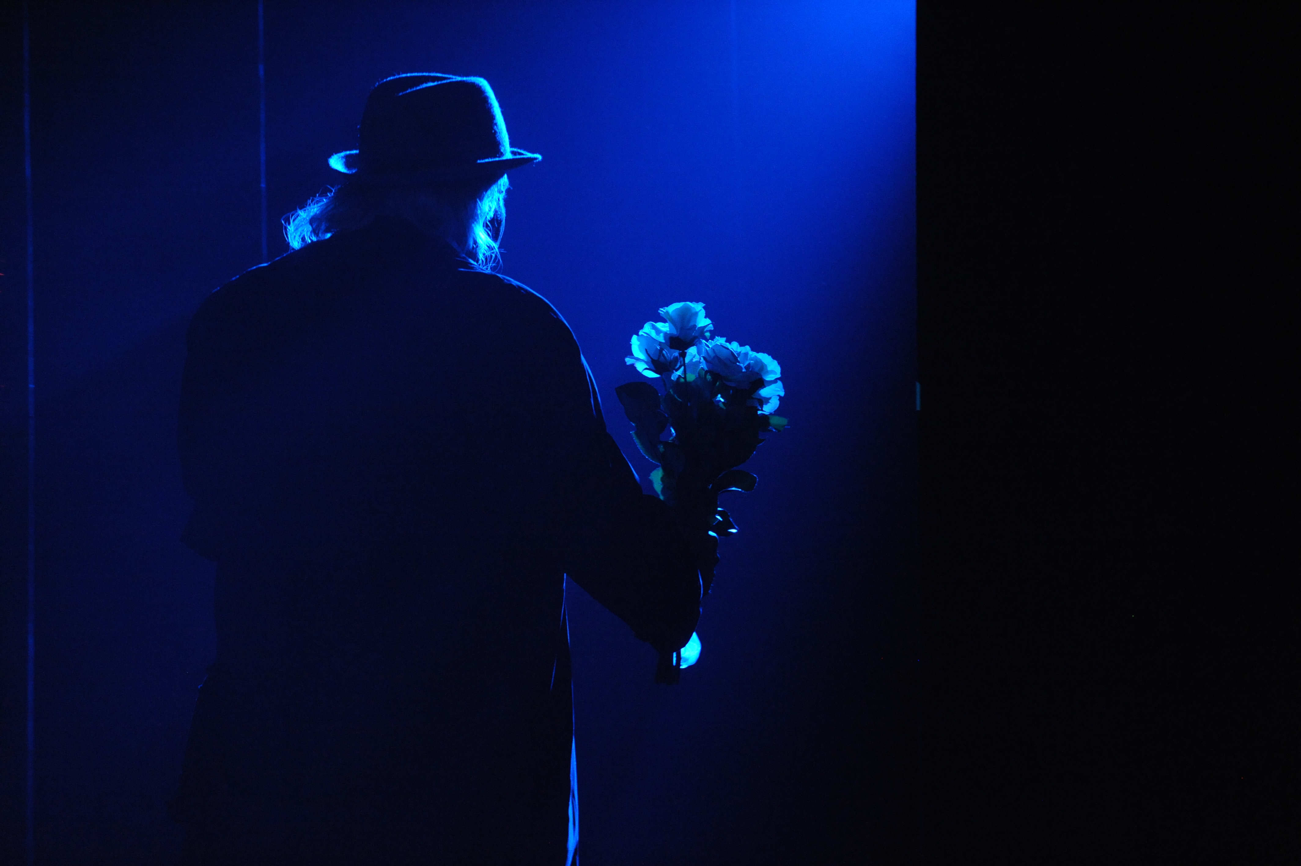 הנסיכה האמריקאית תיאטרון החאן בימוי אודי בן משה צילום גדי דגון